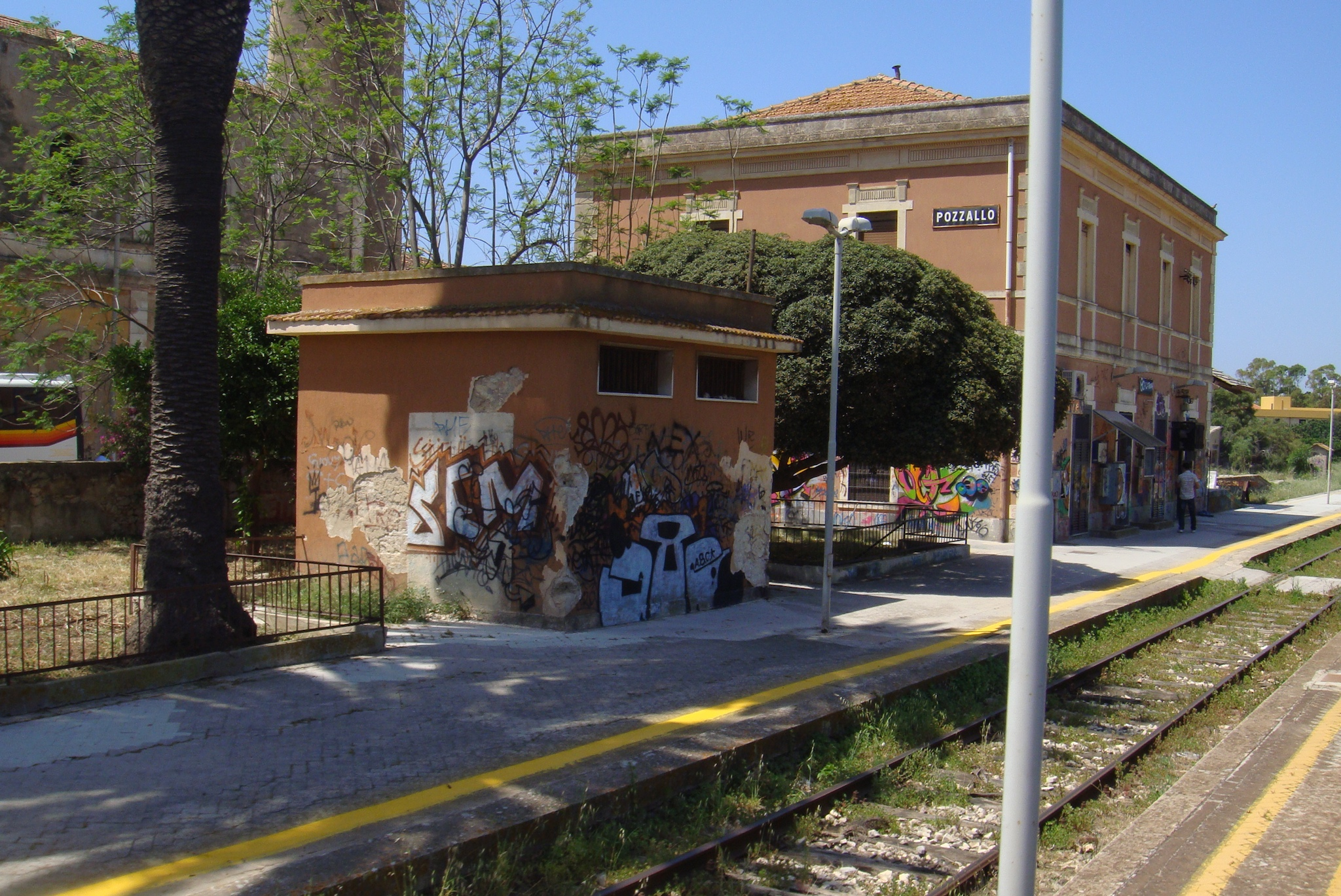 Bahnhof Pozzallo.